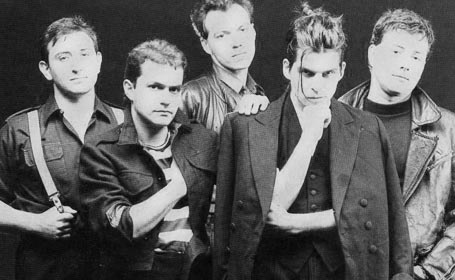 Una foto dei giovani Litfiba.